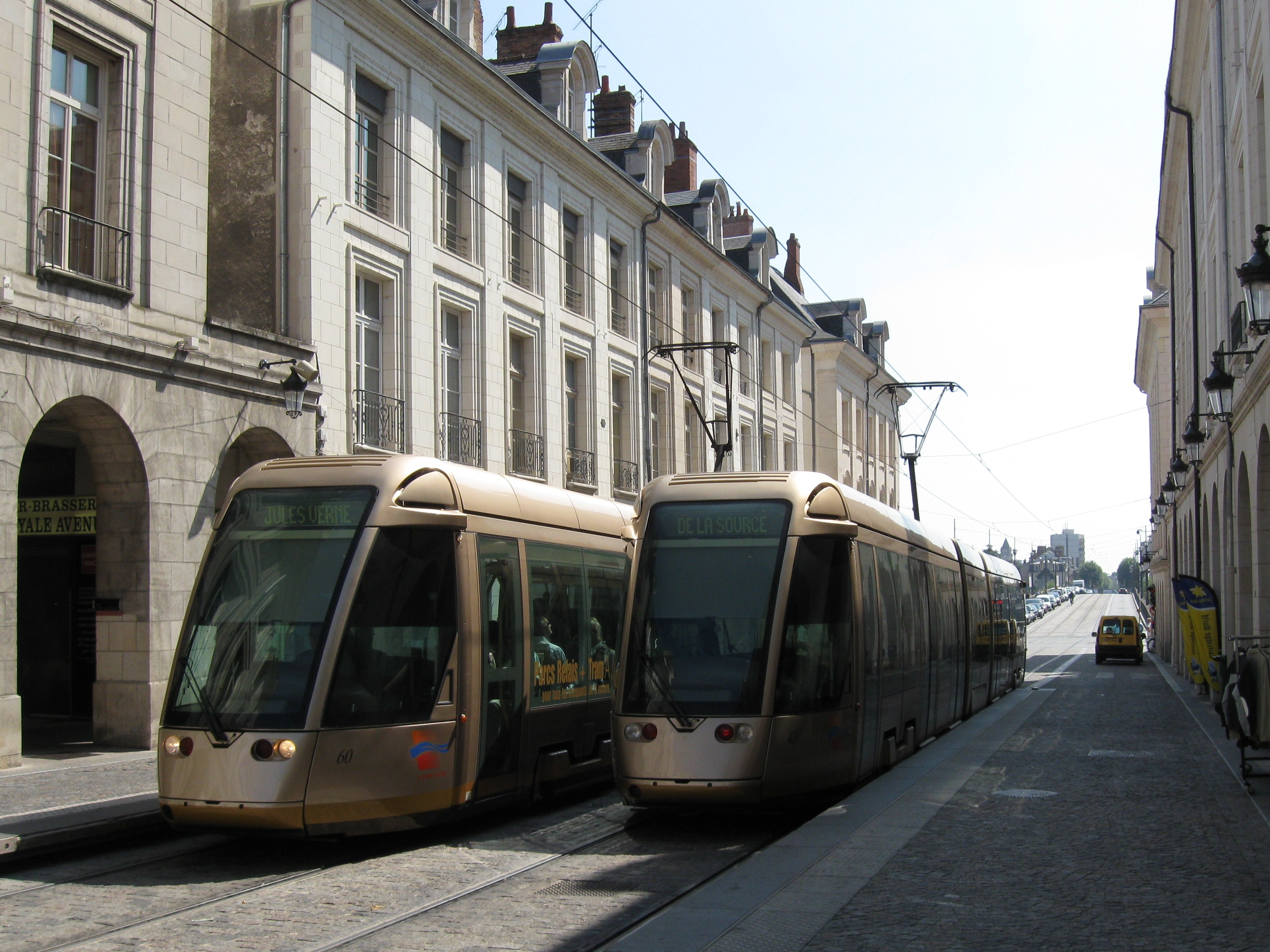 Station de tram Royale - Châtelet, rue Royale, Orléans (Loiret, Centre, France).